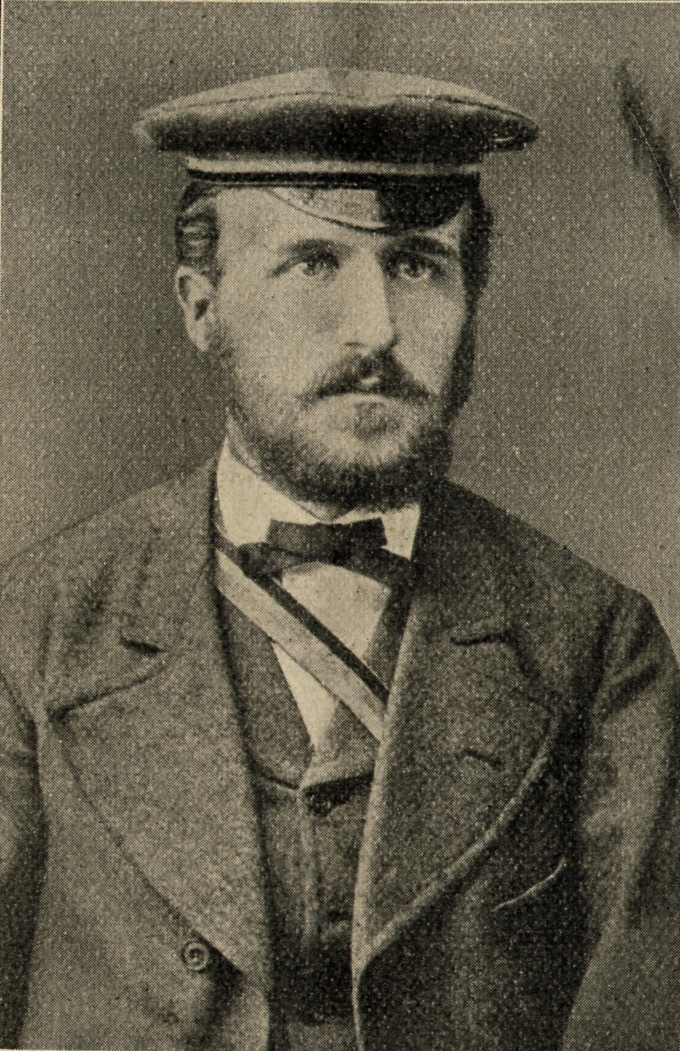 Porträtfotografie von Hermann Haupt (1854-1935) als Würzburger Burschenschafter